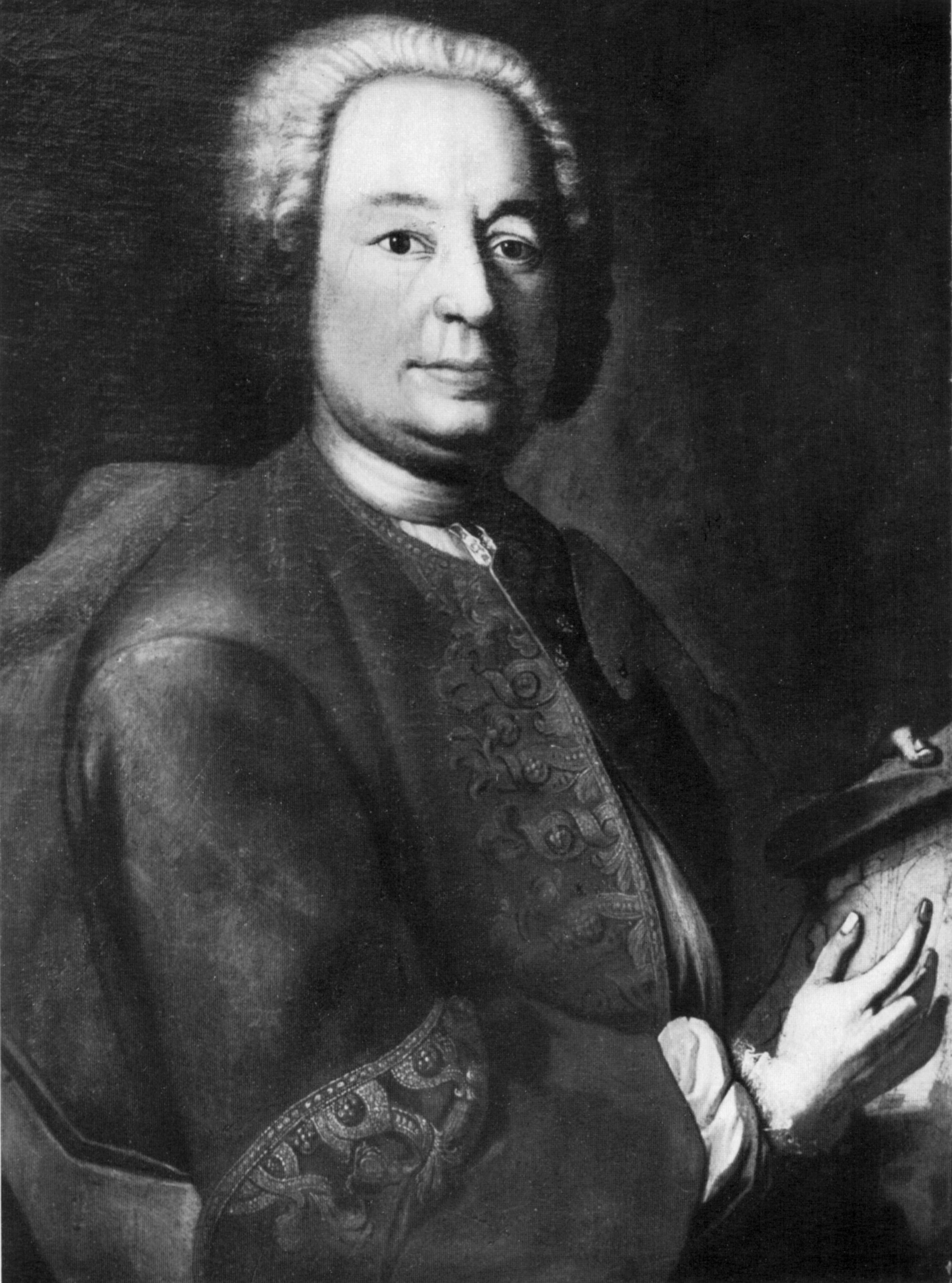 Bildnis wohl des Franz Anton Bagnato, Biberach, Städt. Sammlungen